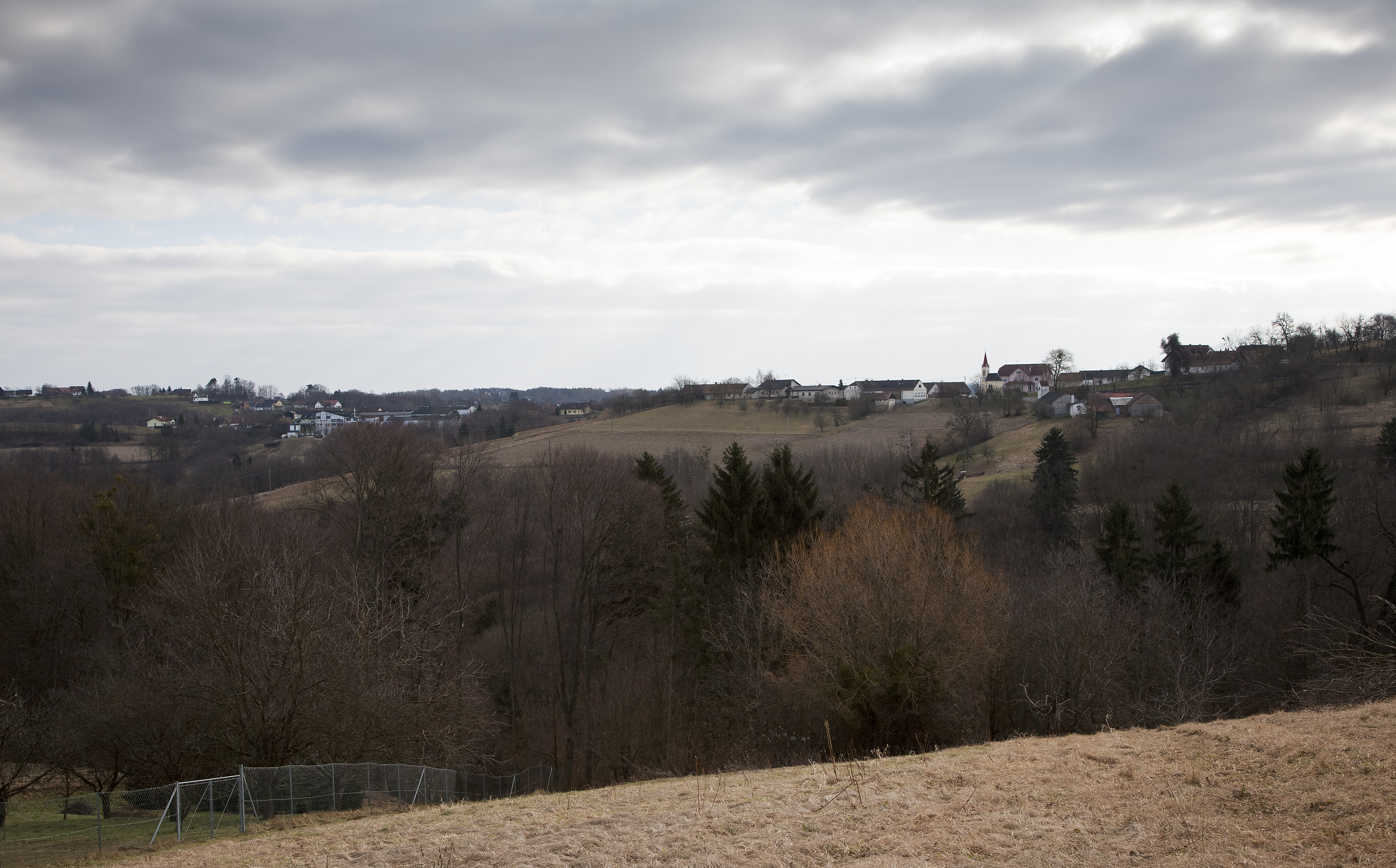 Krobotek vom Potschenberg_Nordwestansicht